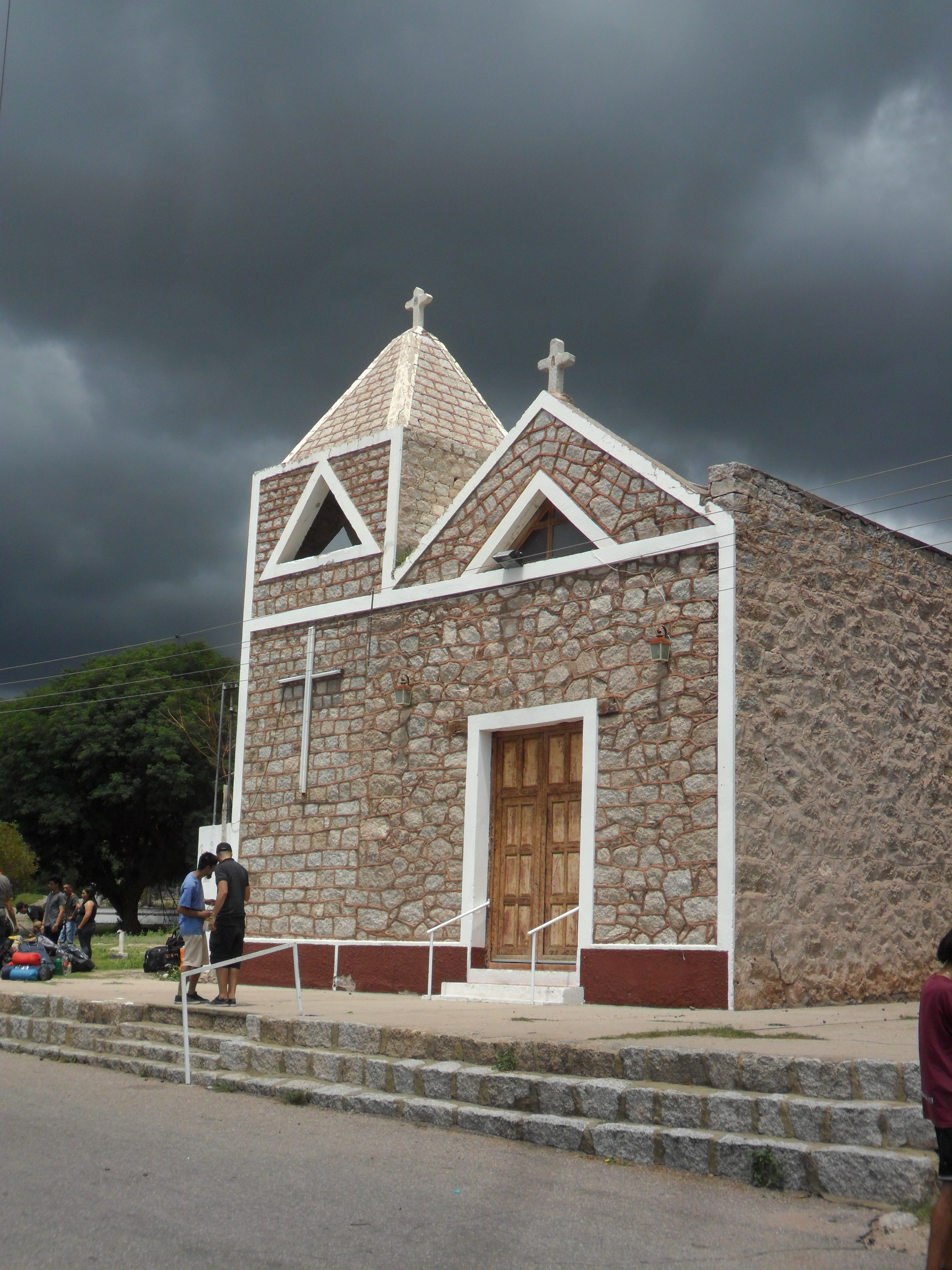 Iglesia hecha de piedra en la plaza principal en Santa Vera Cruz, La Rioja, Argentina (2017).